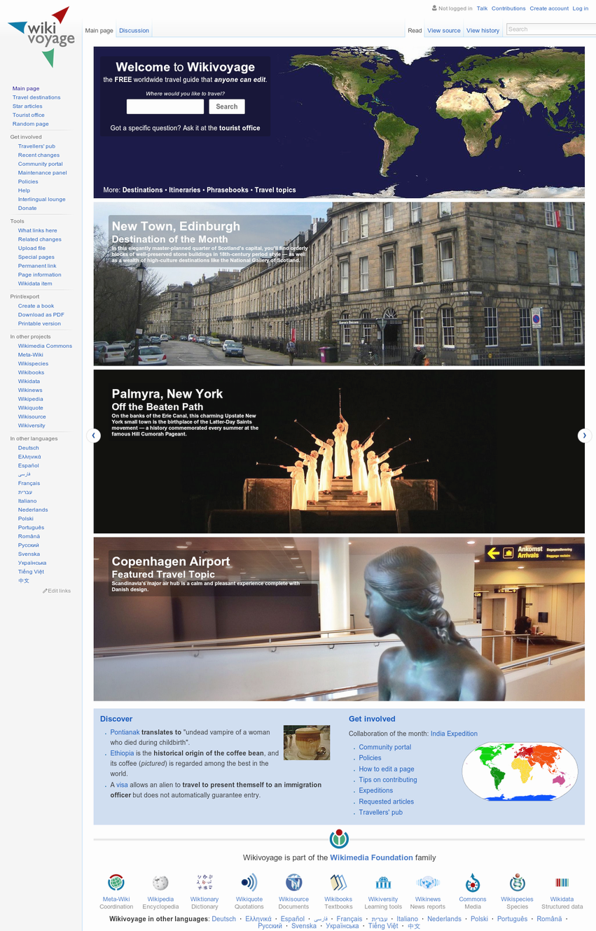 نماگرفت از صفحه ویکی سفر انگلیسی